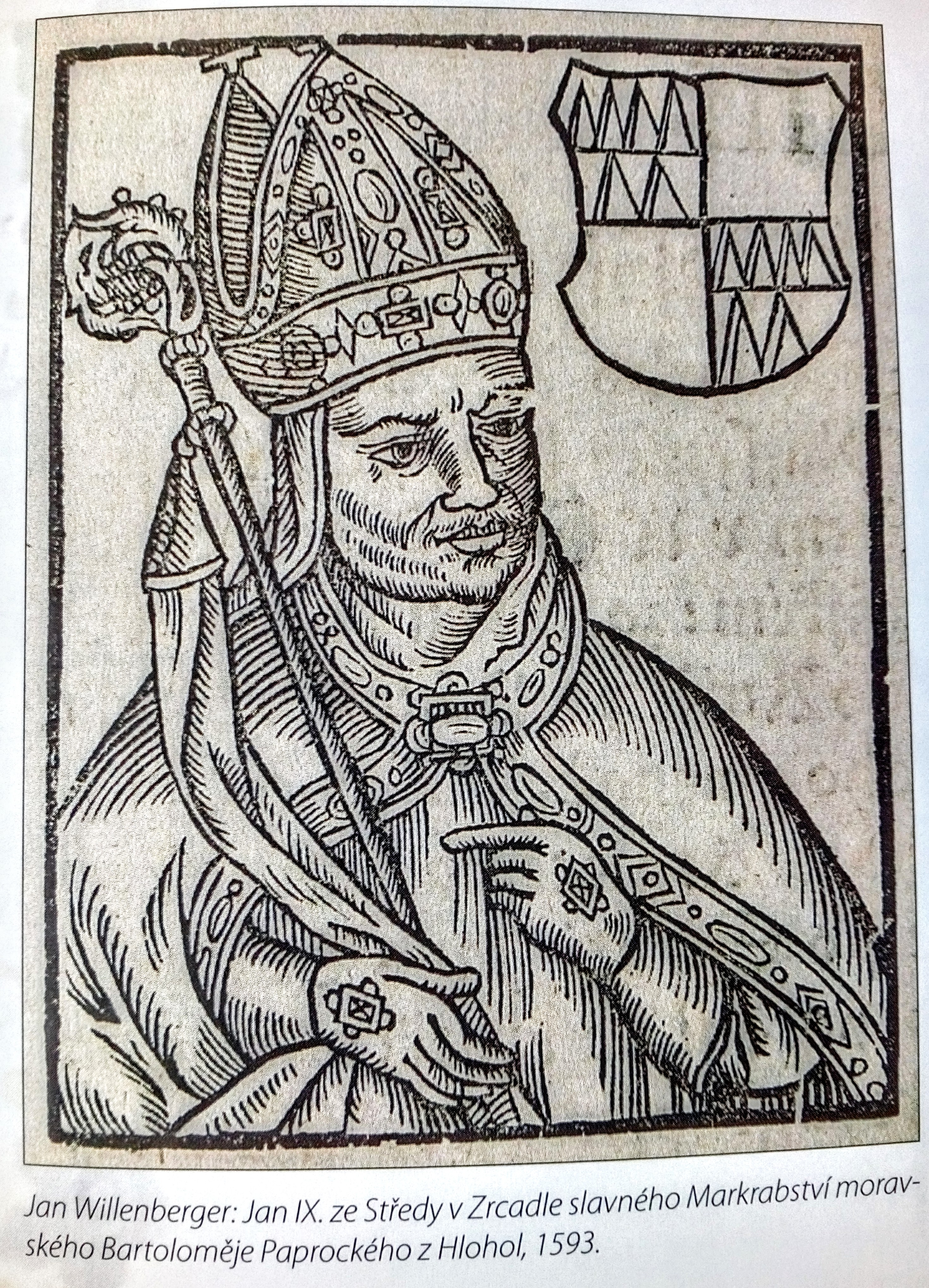 Jan IX. ze Středy v Zrcadle slavného Markrabství moravského Bartoloměje Paprockého z Hlahol, 1593